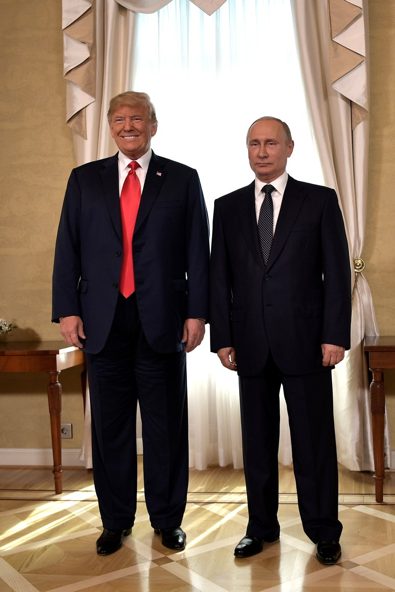 С Президентом Соединённых Штатов Америки Дональдом Трампом перед началом переговоров.